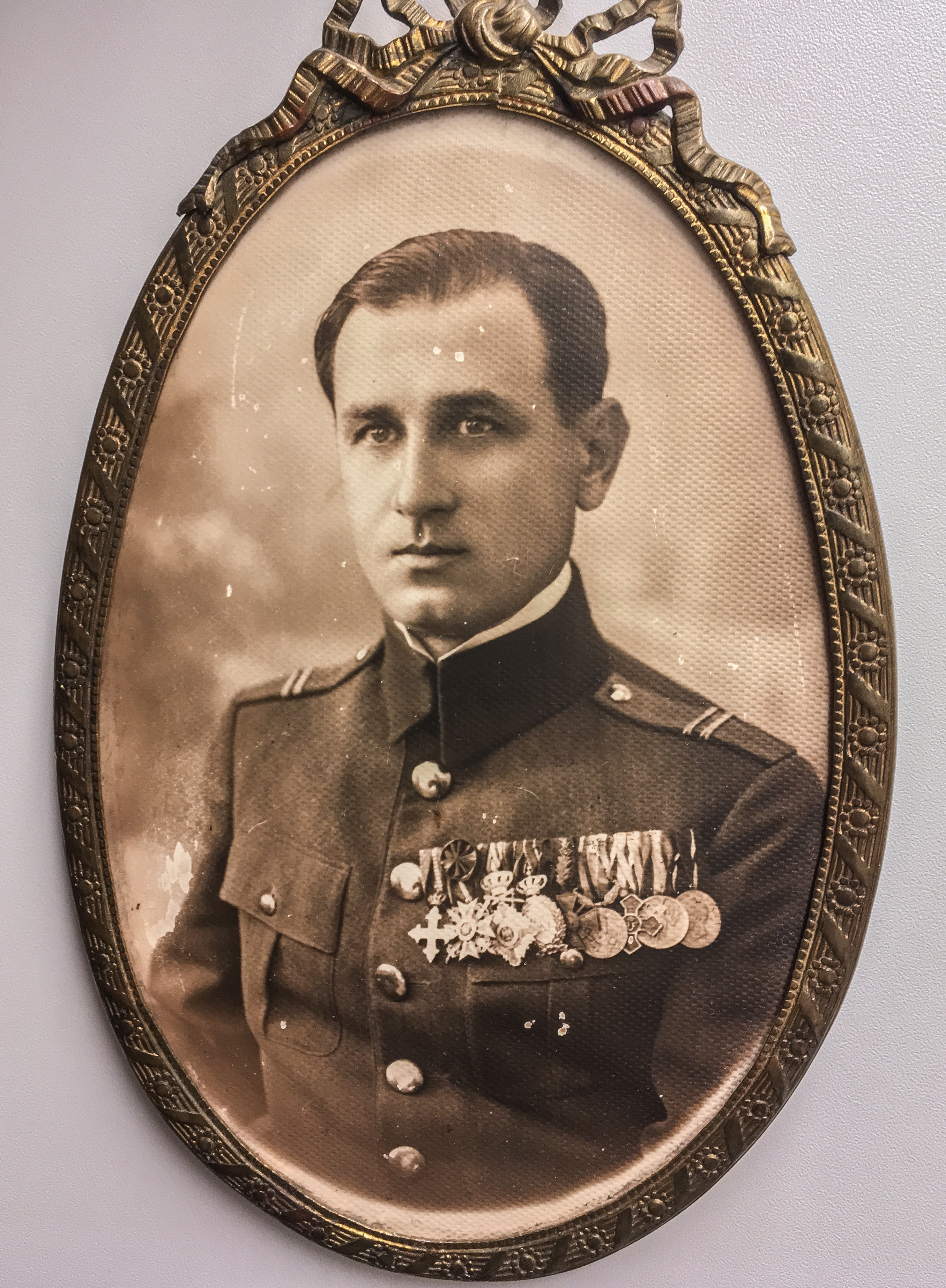 fotografie a Generalului Costescu Nicolae din 1917 - 1921? cu decoratiile sale din primul razboi